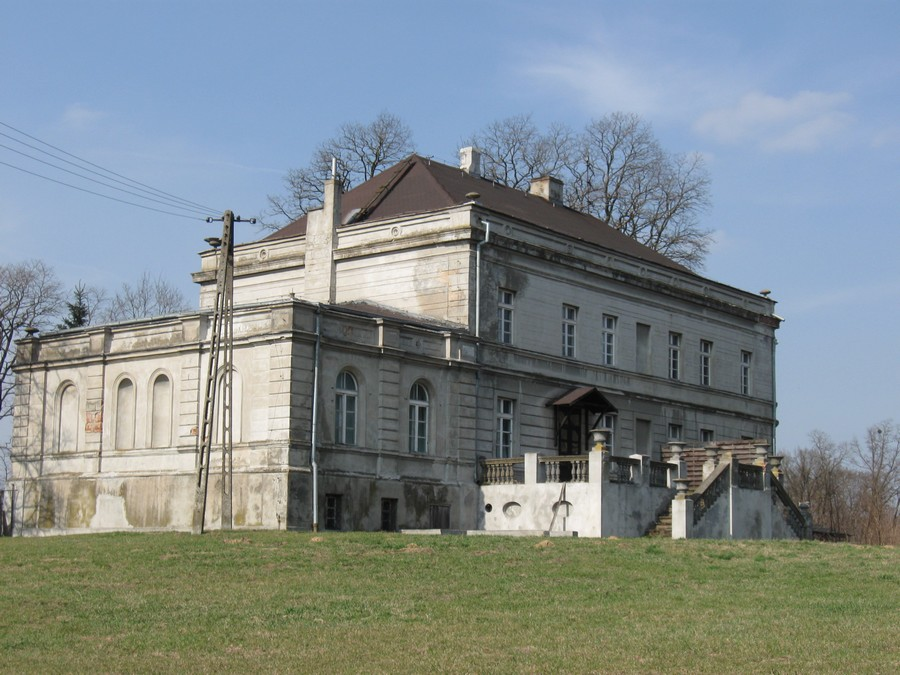 Pałac w Piechcinie (zabytek nr 184/A)